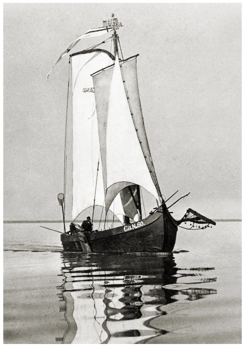 "Kurenkahn aus Gilge" Großer, freisegelnder Keitelkahn Gil. No 60 auf dem Kurischen Haff. Neben der Fock ist auch der Brummer gesetzt (nur bei Keitelkähnen üblich). Dieser Kahn ist die reale Vorlage für das Modell des Kahns von Heinz Suchhardt.